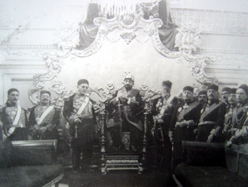 Moncef Bey entouré des princes beylicaux et de ses minitres Hédi Lakhoua (premier ministre), Abdeljelil Zaouche (justice) et Habib Djellouli (plume)